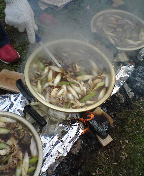 河川敷で行なわれる芋煮会のようす